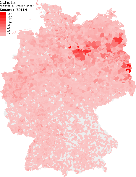 Verteilung des Nachnamens Schulz in Deutschland nach dem Telefonbuch mit Stand vom 6. Januar 2005 Source: selbst erstellt Ersteller: W. Baumgartner